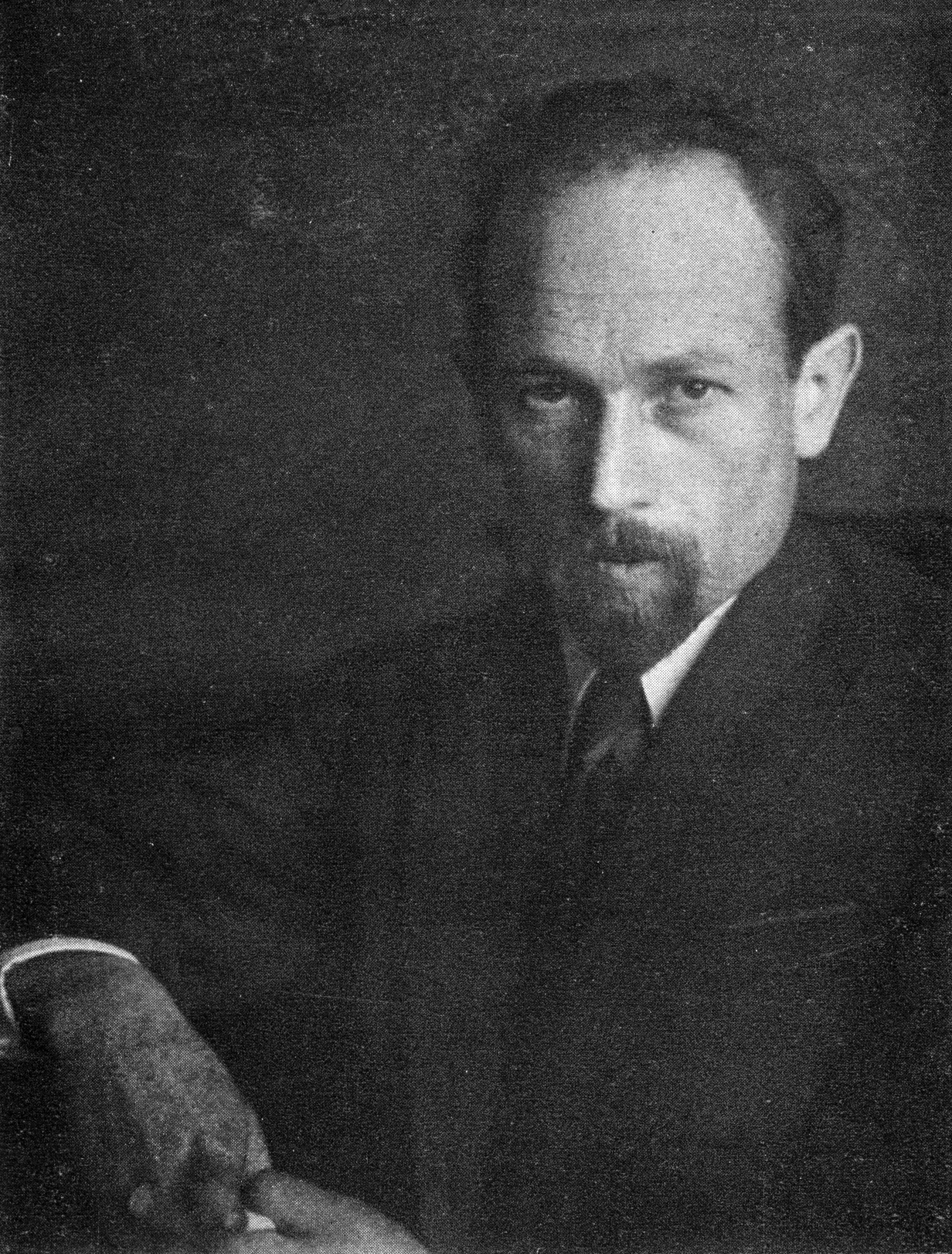 Фотографія Івана Кулика